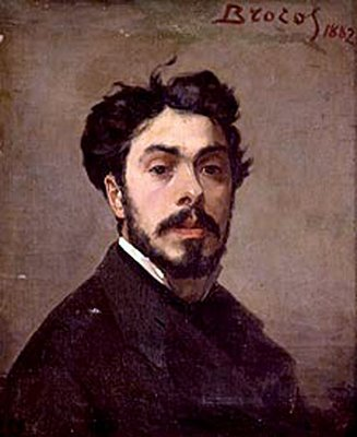 Autorretrato.